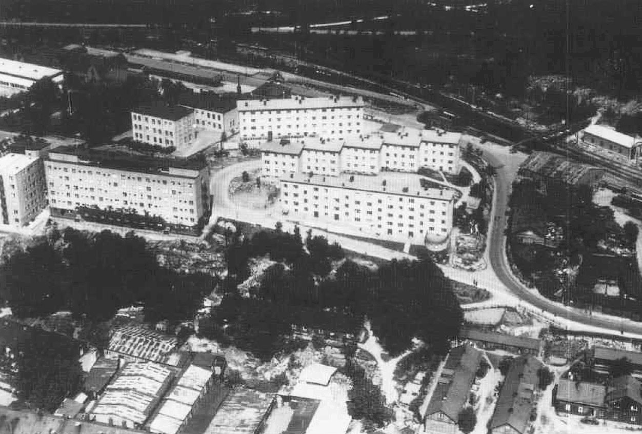 Stickelbärsvägen och området Körsbärshagen (längst i bakgrunden syns längan Stickelbärsvägen 5-9)